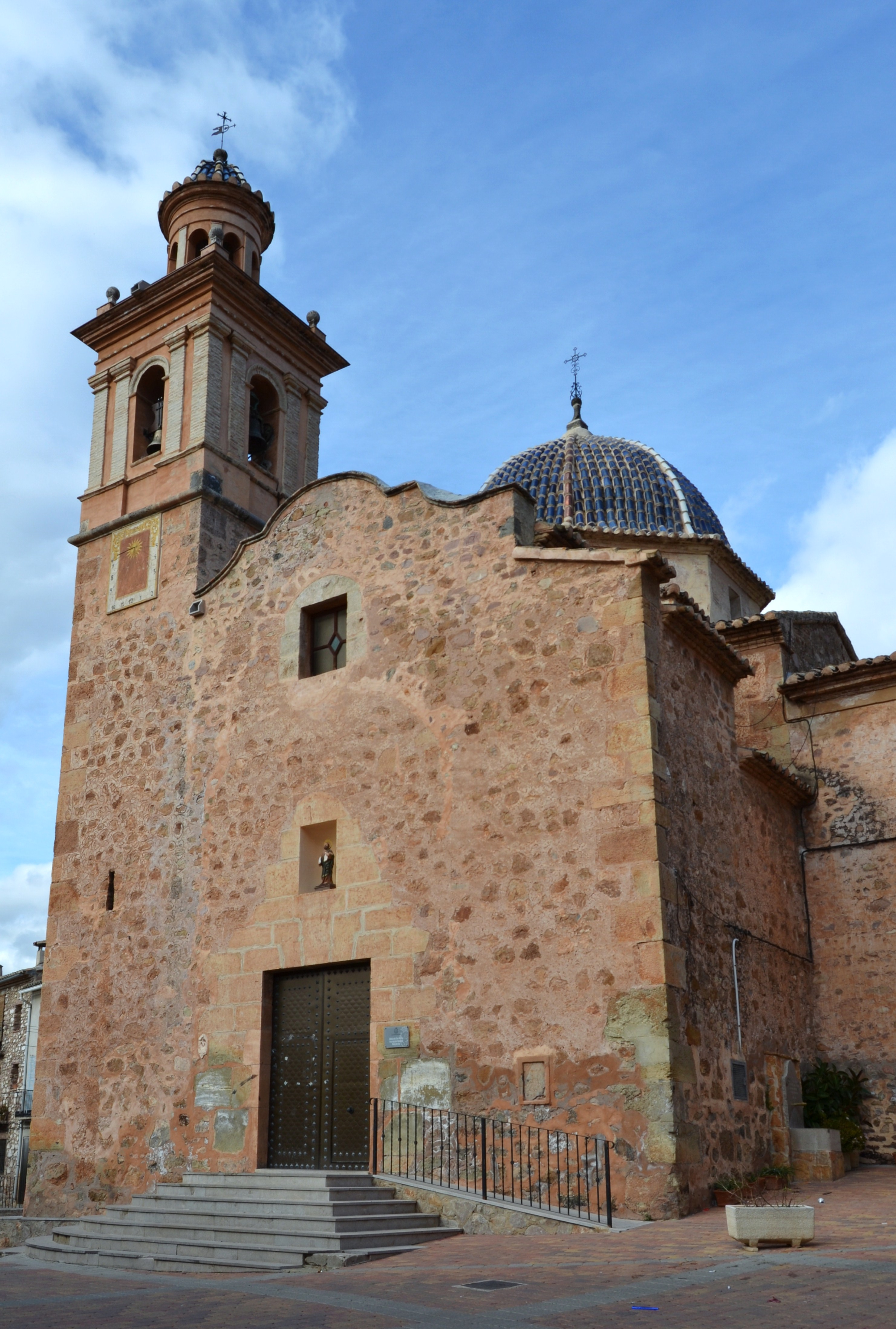 Església de sant Mateu d'Assuévar.